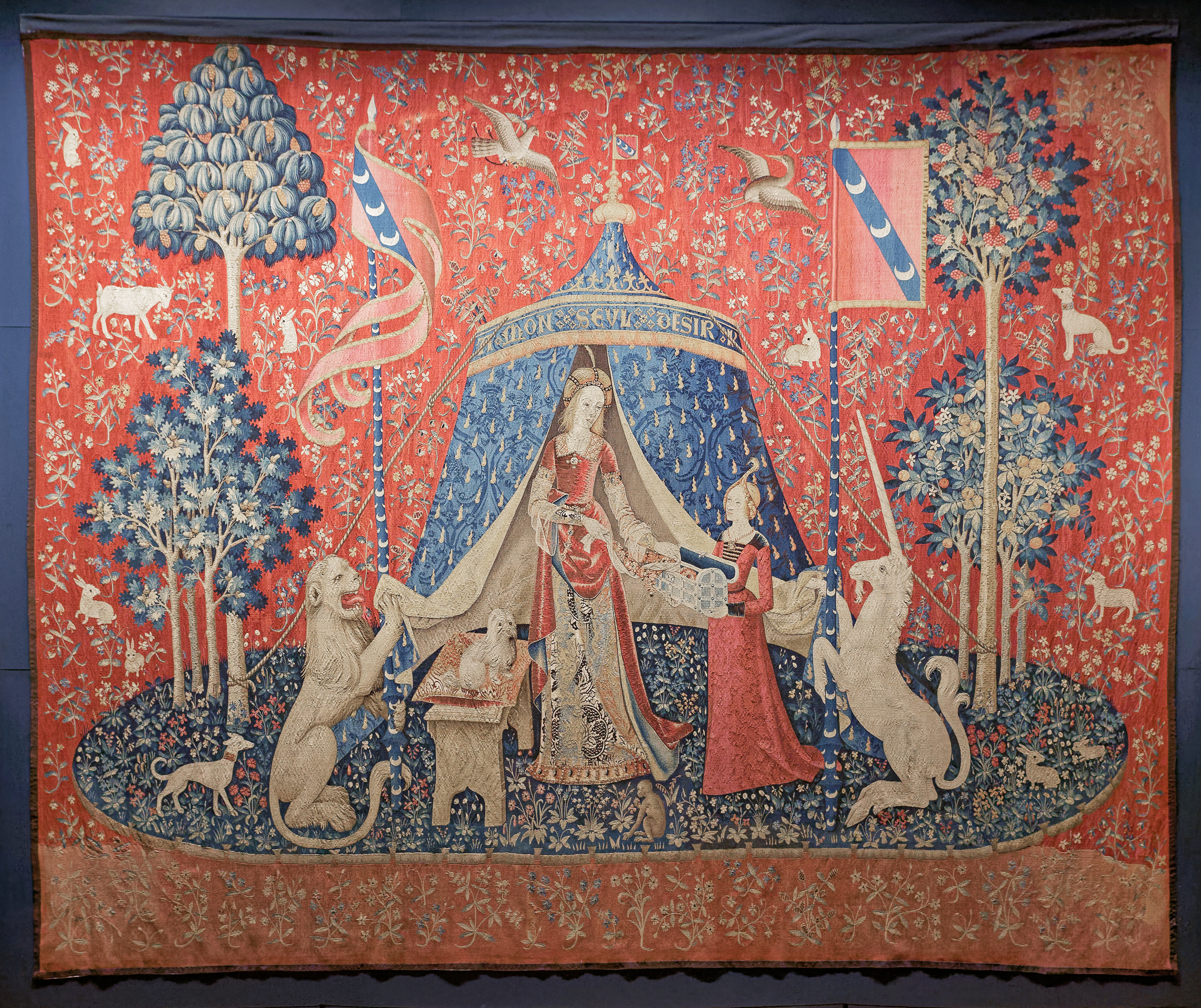 La Dame à la licorne, A mon seul désir.